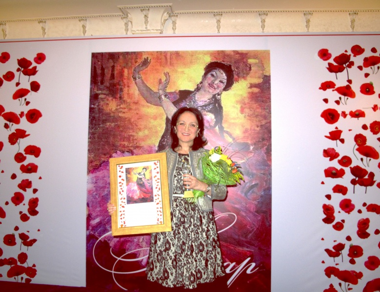 22 ноября 2012 года Джамиля Нурманбетова стала лауреатом Национальной премии общественного признания достижений женщин Казахстана «Ажар».